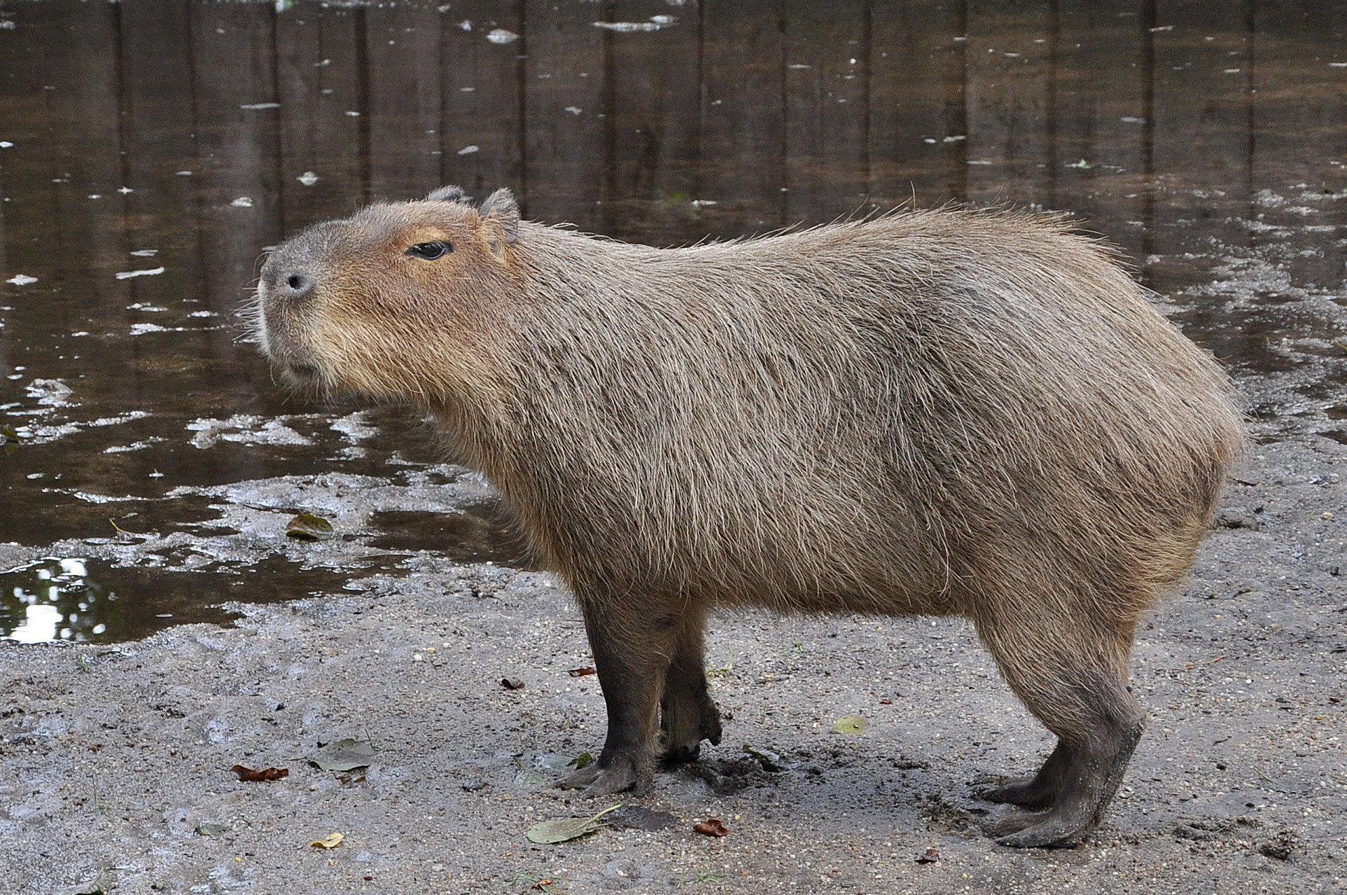 Een capibara in het familiepark Harry Malter te Heusden (O-Vl) België